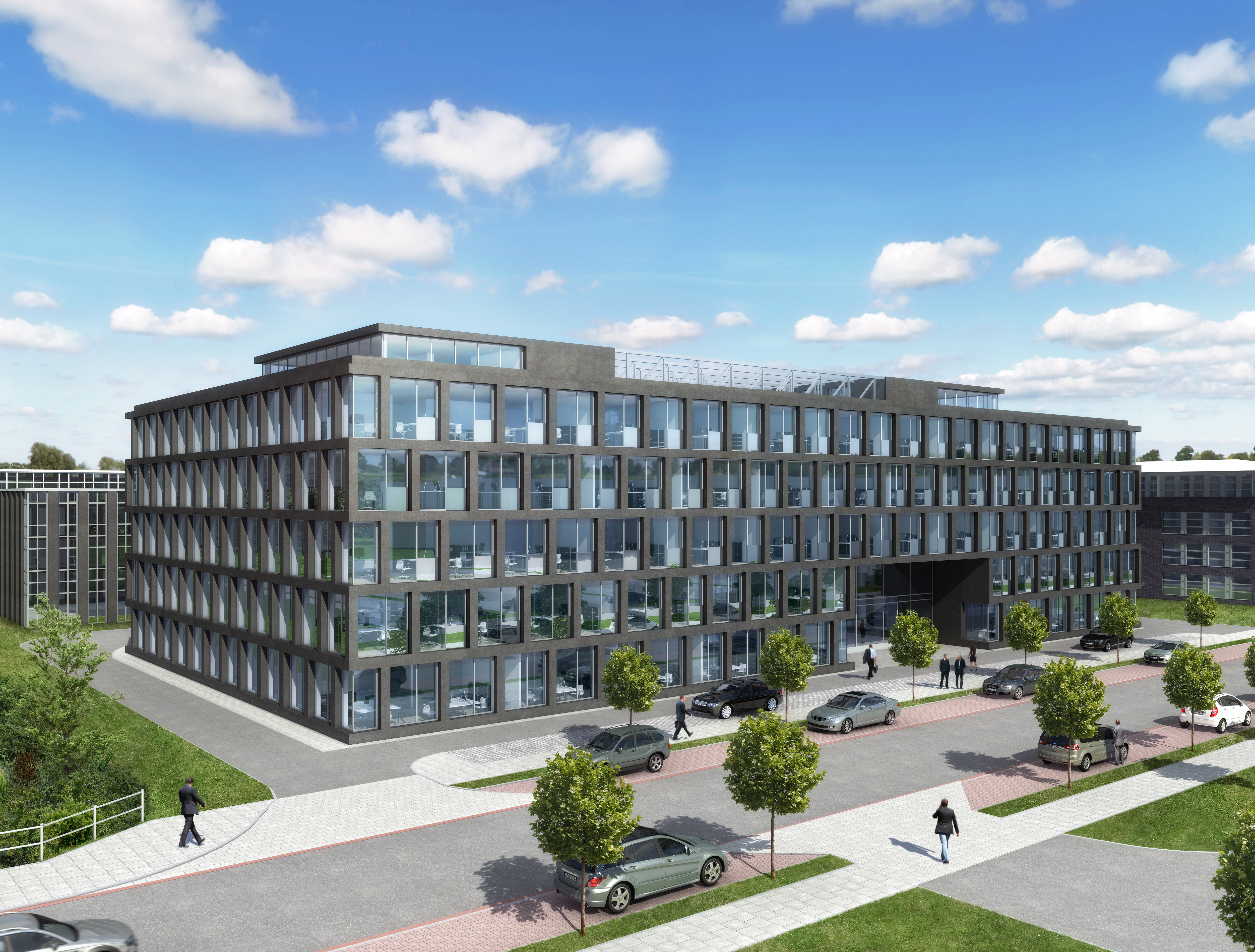 Firmenzentrale der OAS AG, Caroline-Herschel-Str. 1 in Bremen